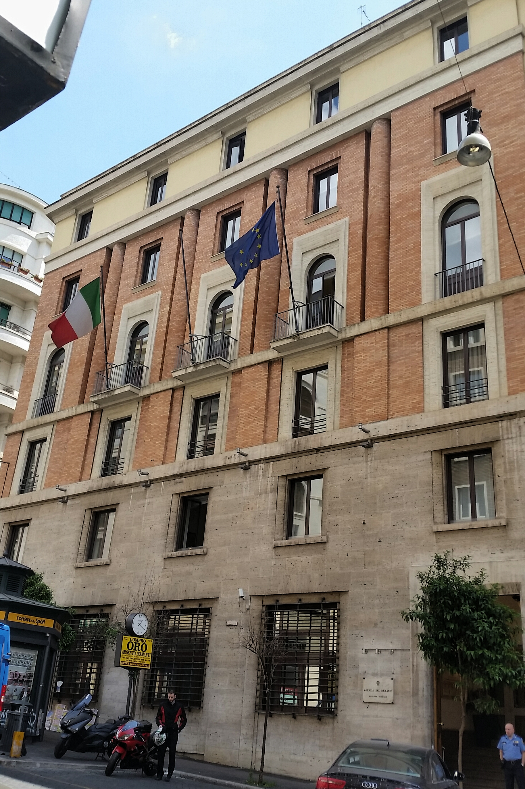 Sede principale dell'Agenzia del Demanio a Roma